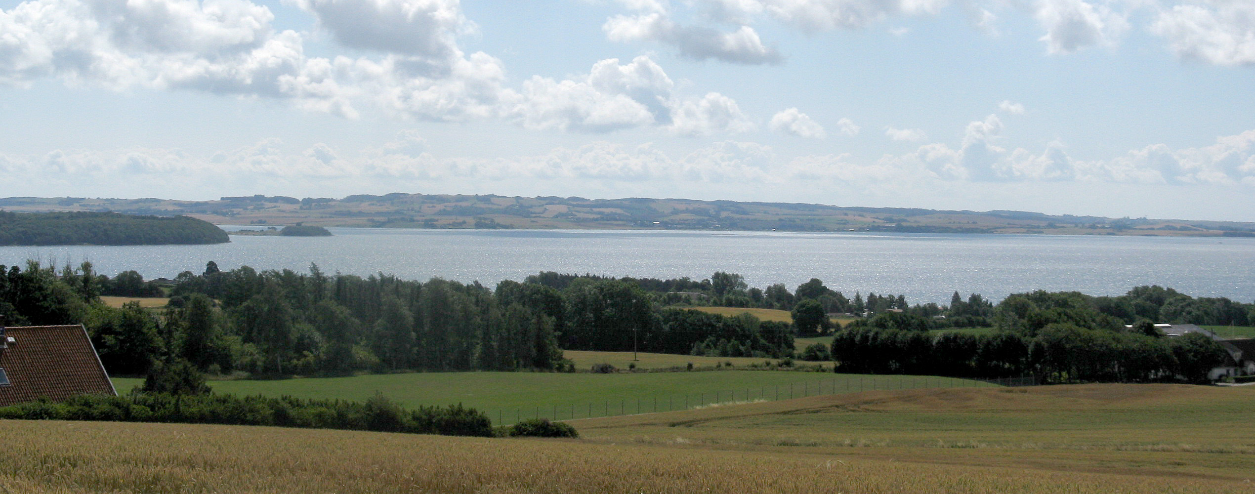 Kalø Vig set fra vest ved Uggelbølle, med Kalø Slot og Mols Bjerge